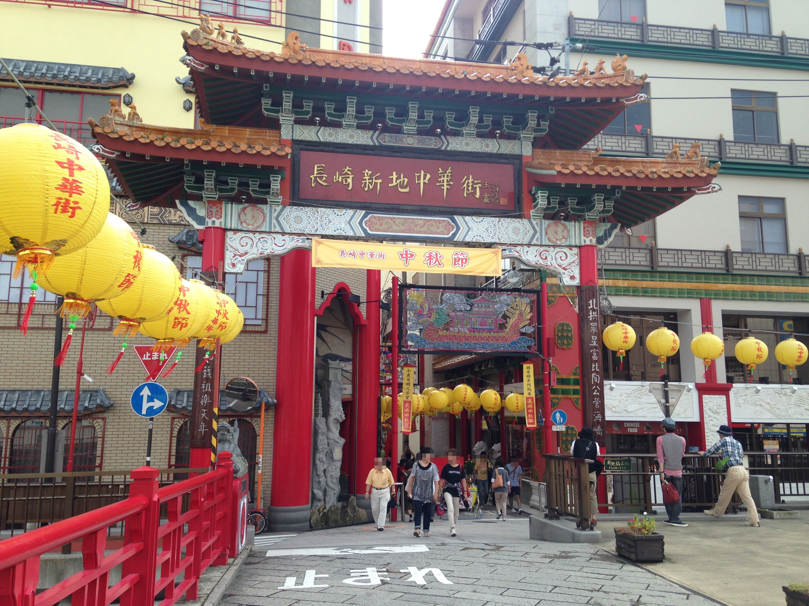 長崎新地中華街・玄武門